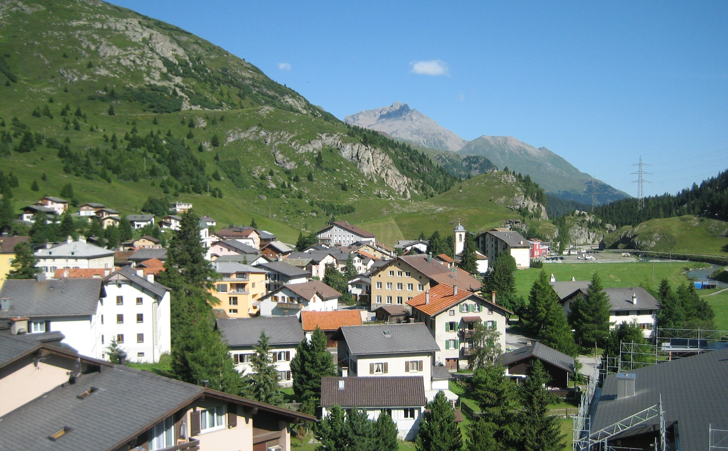 Bivio